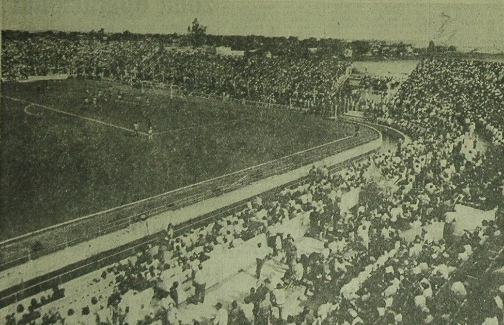 Estadio de Colón en la victoria ante Unión por 3-1, del 4 de abril de 1976.